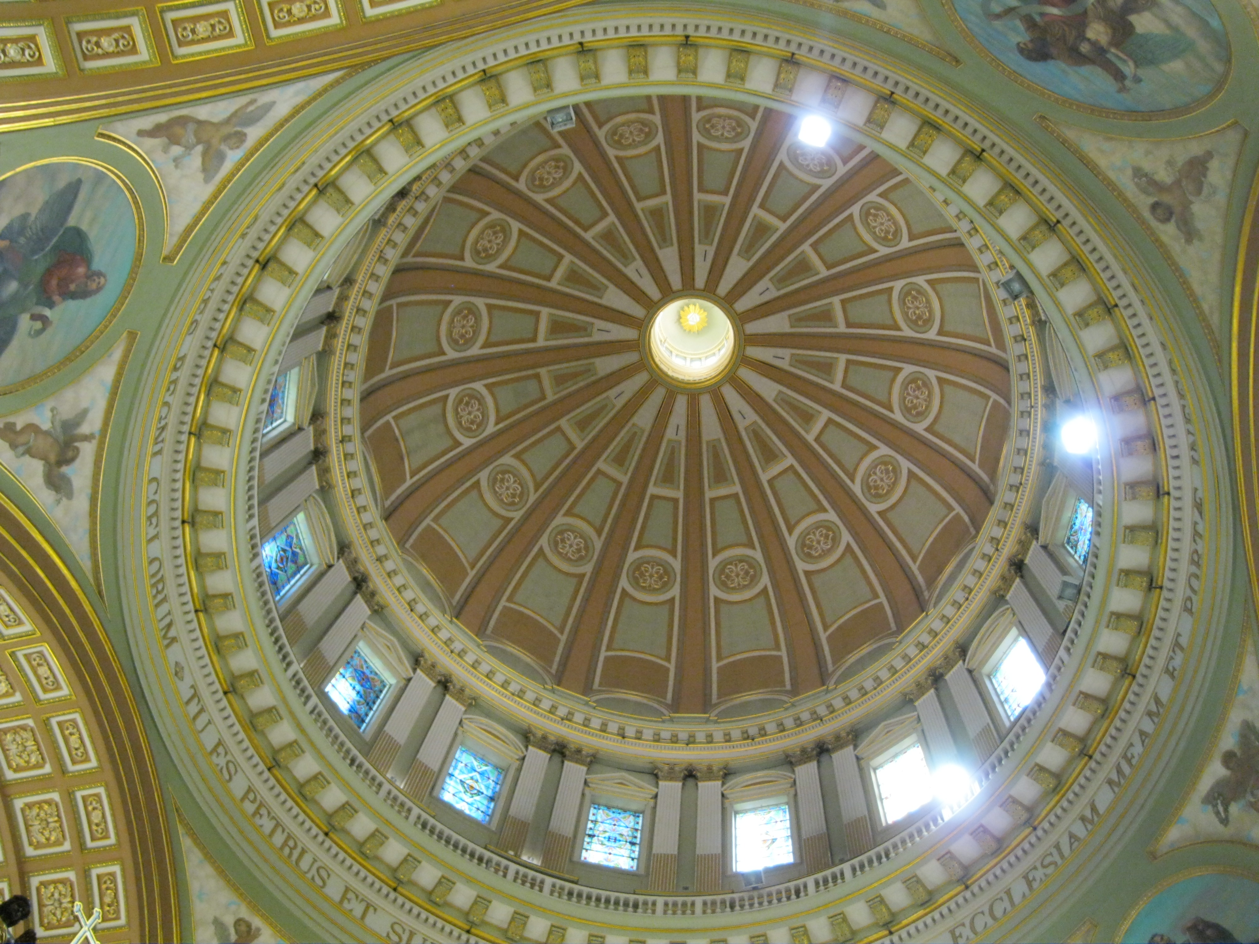 Basilique-cathédrale Marie-Reine-du-Monde, Montréal